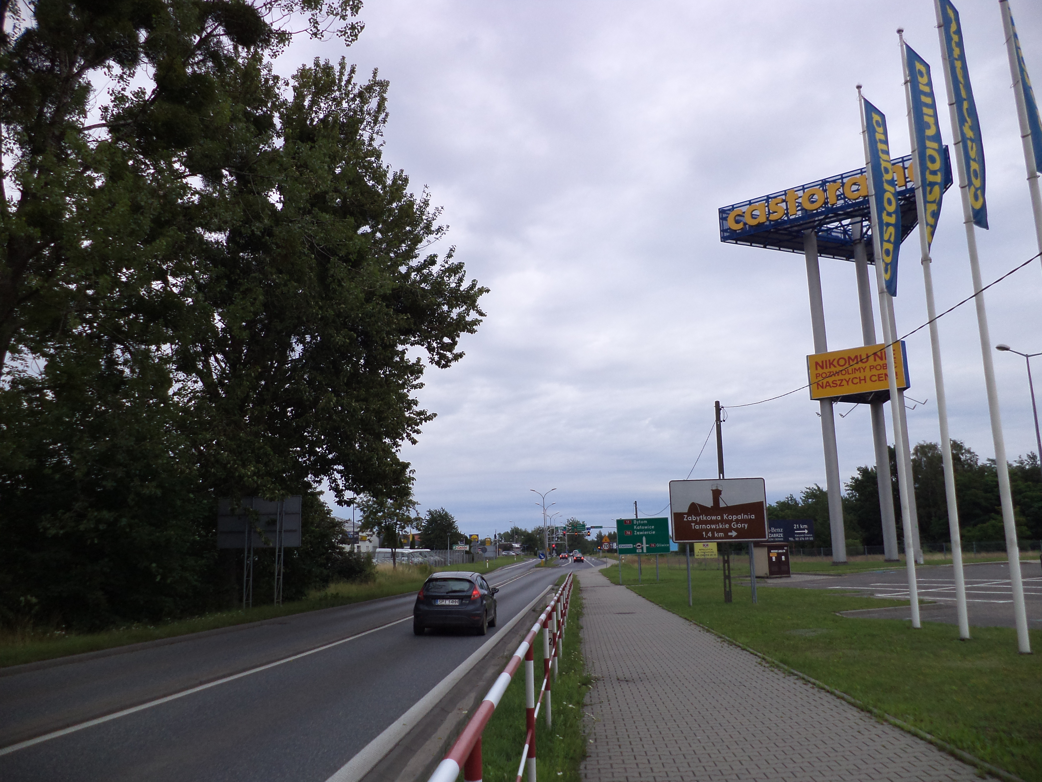 Obwodnica Śródmiejska (ul. Obwodnica, ul. Obwodowa) w Tarnowskich Górach. Fragment DK11 oraz DK78